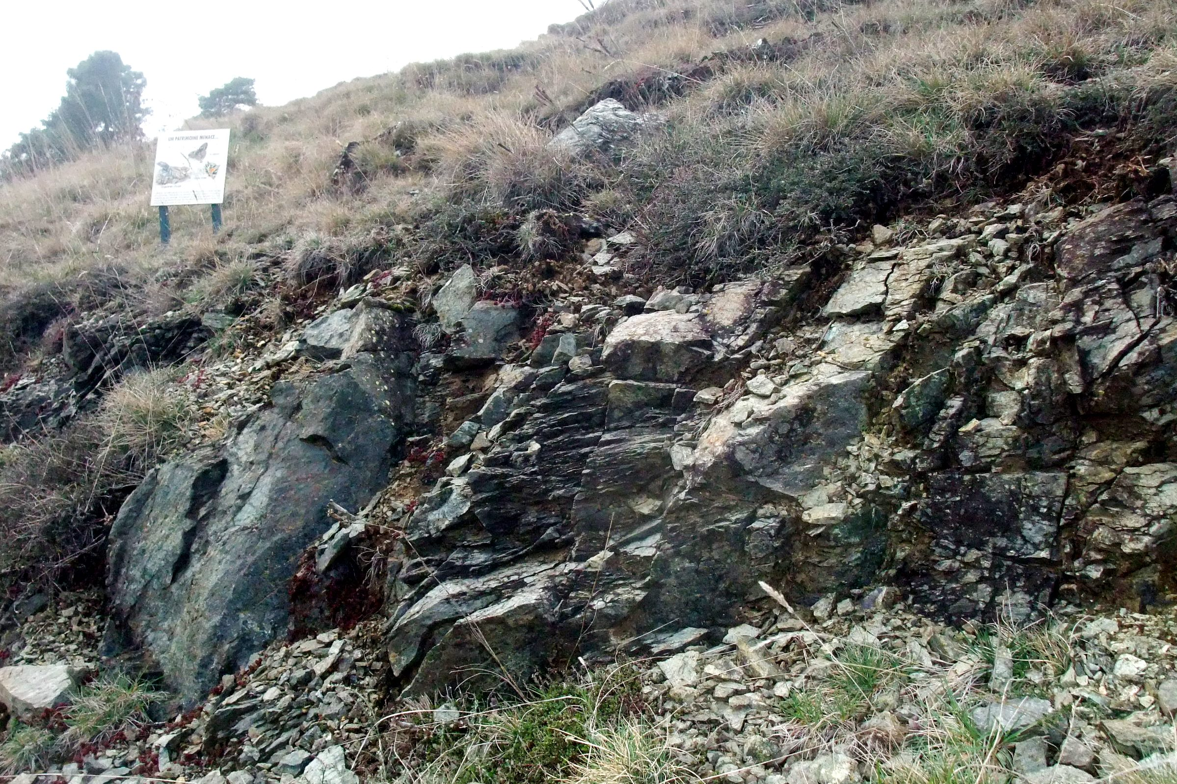 Savas suc de Clava serpentine